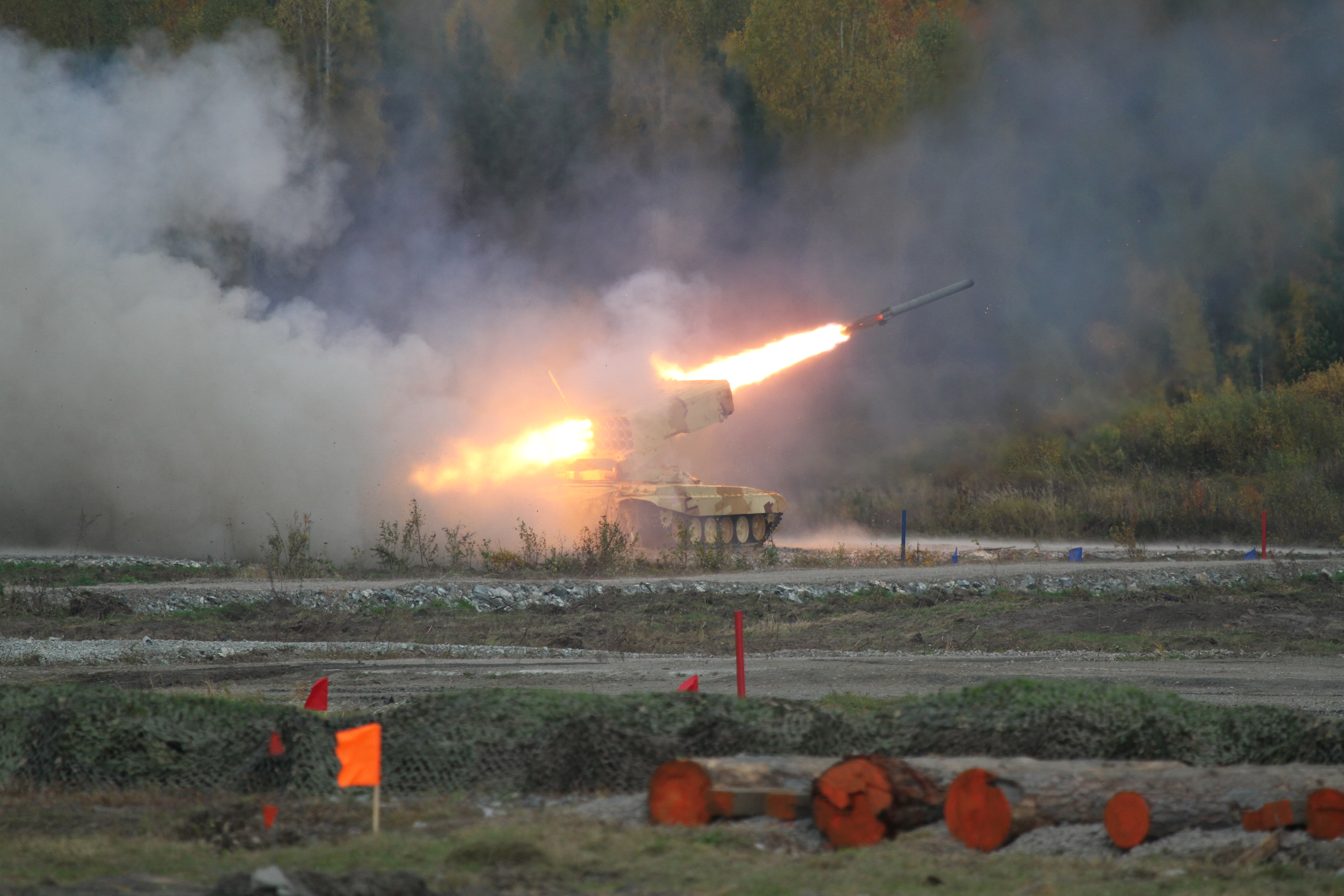 Тяжёлая огнемётная система ТОС-1А (Heavy flamethrower system TOS-1A)